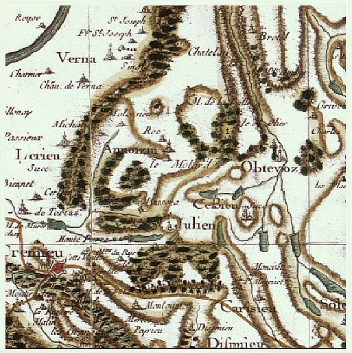 carte